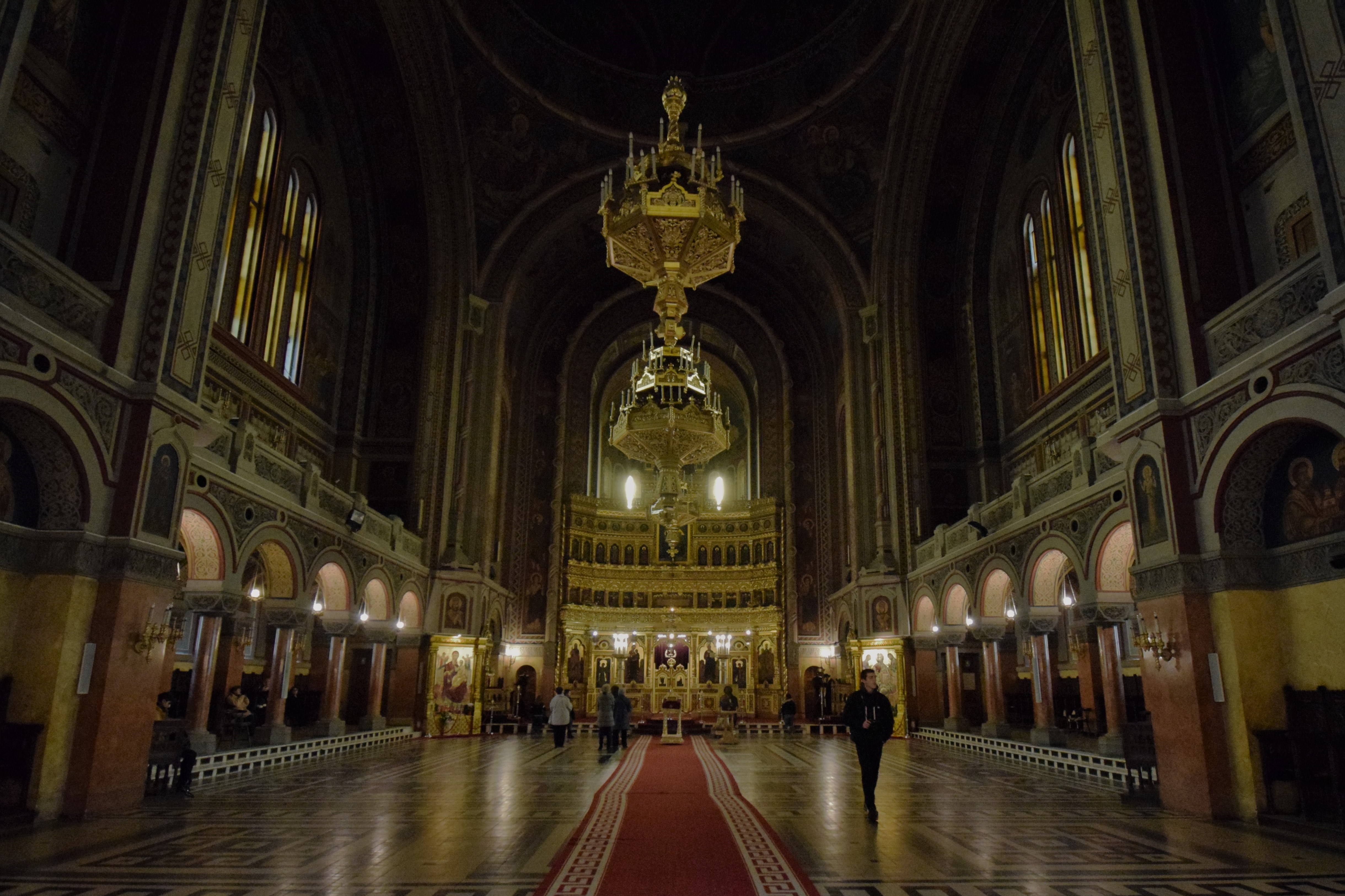 Interior de la Catedral Ortodoxa de Timișoara.